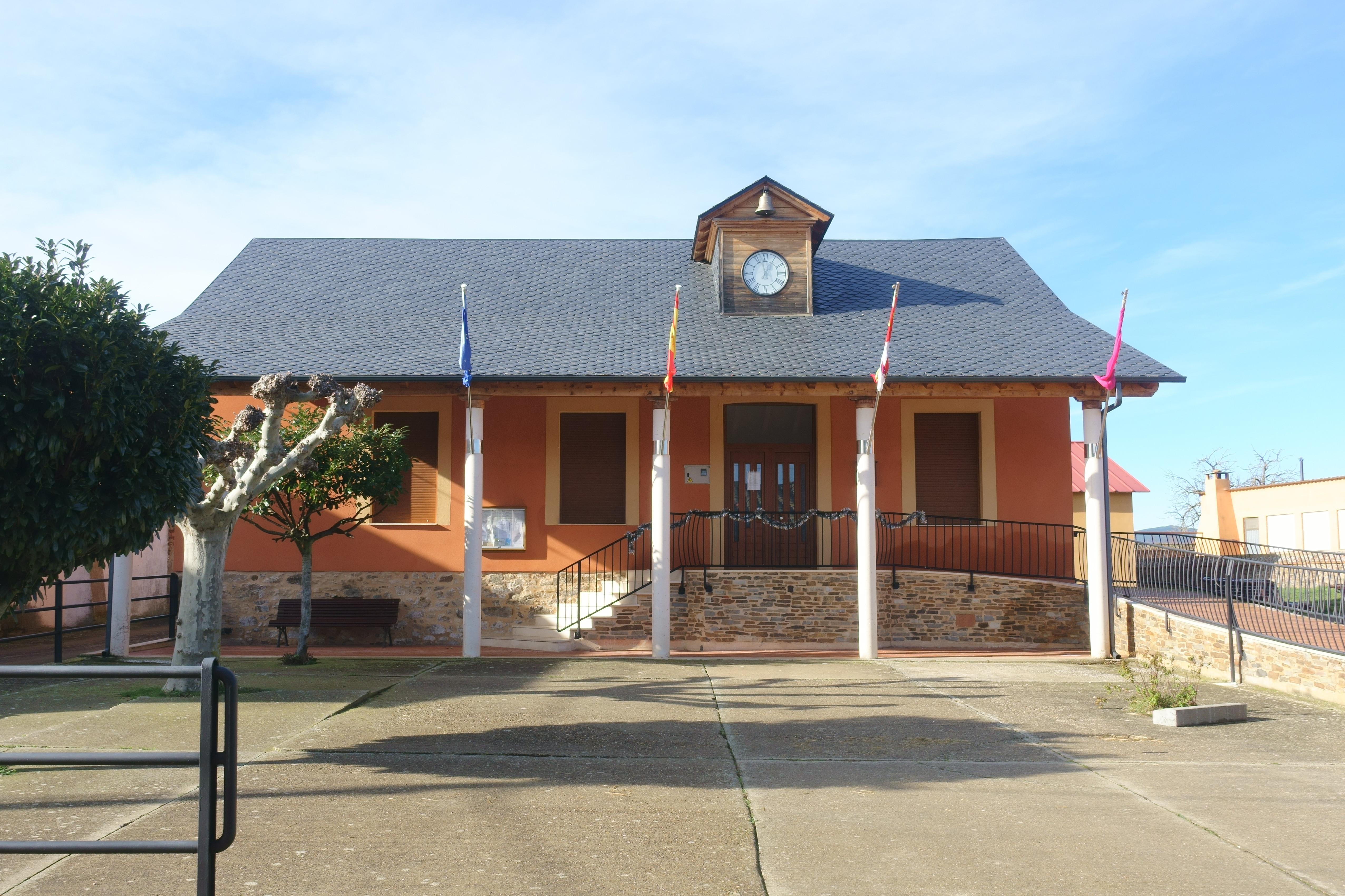 Casa consistorial de Magaz de Cepeda (León, España).